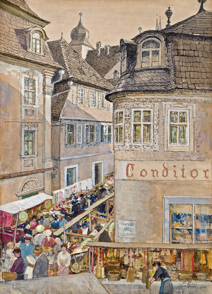 Wochenmarkt in Marktbreit am Main.title QS:P1476,de:"Wochenmarkt in Marktbreit am Main." label QS:Lde,"Wochenmarkt in Marktbreit am Main."